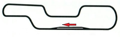 Autódromo Don Eduardo de Las Parejas